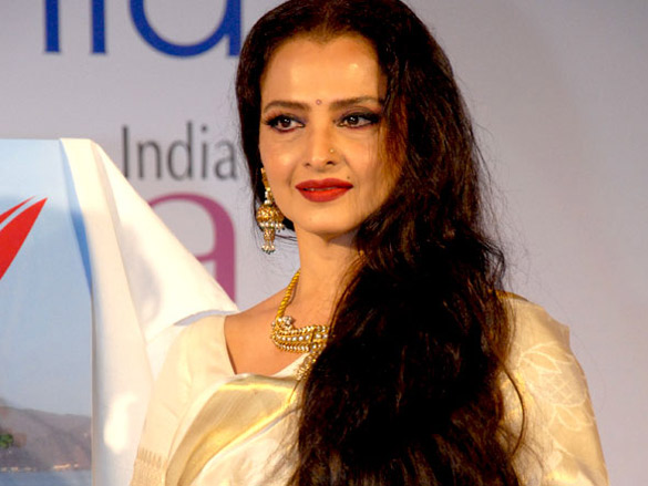 Rekha at Pevonia asiaSpa India Awards 2010